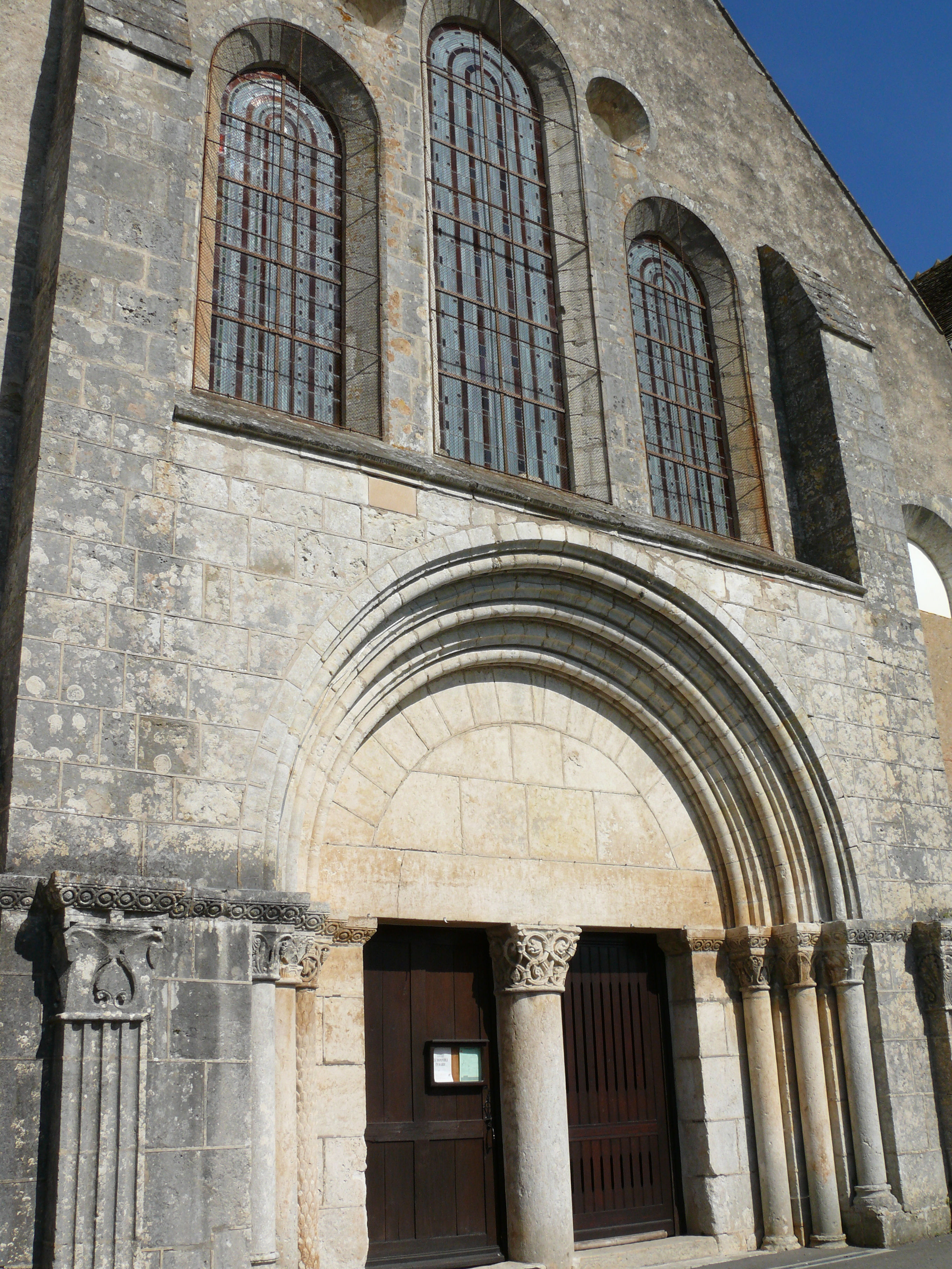 Chezal-Benoît - Abbatiale - Façade